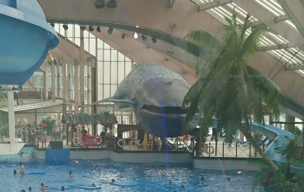 La baleine, départ d'un toboggan, à l'aquaboulevard de Paris.